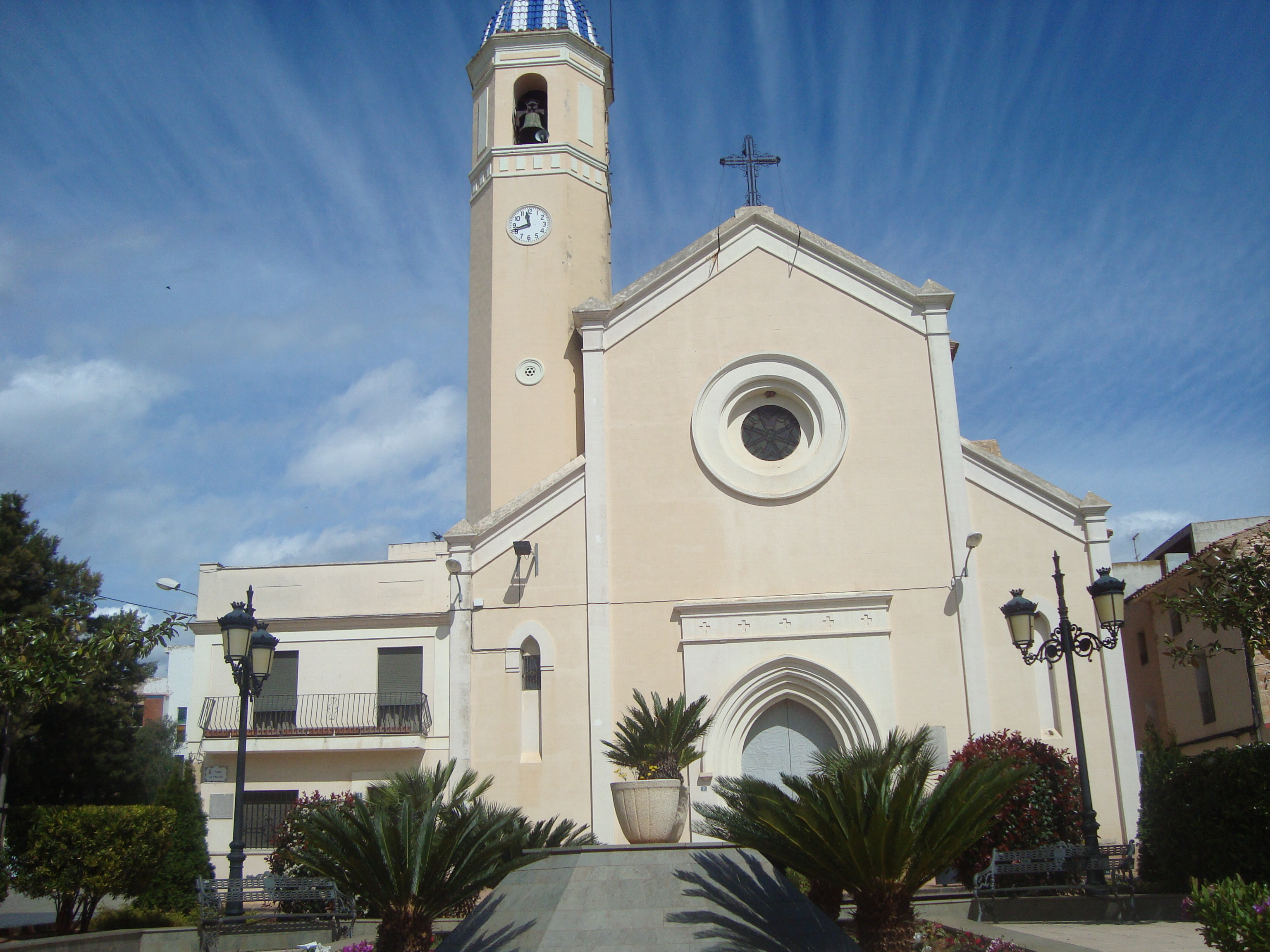 Església parroquial de Sant Joan Baptista (la Vall d'Alba) 05.124-001.